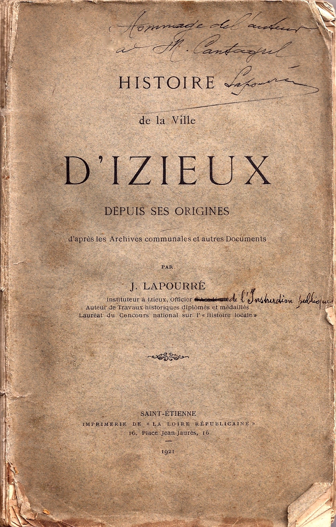 Histoire de la ville d'Izieux, Jean Lapourré, 1921, couverture.